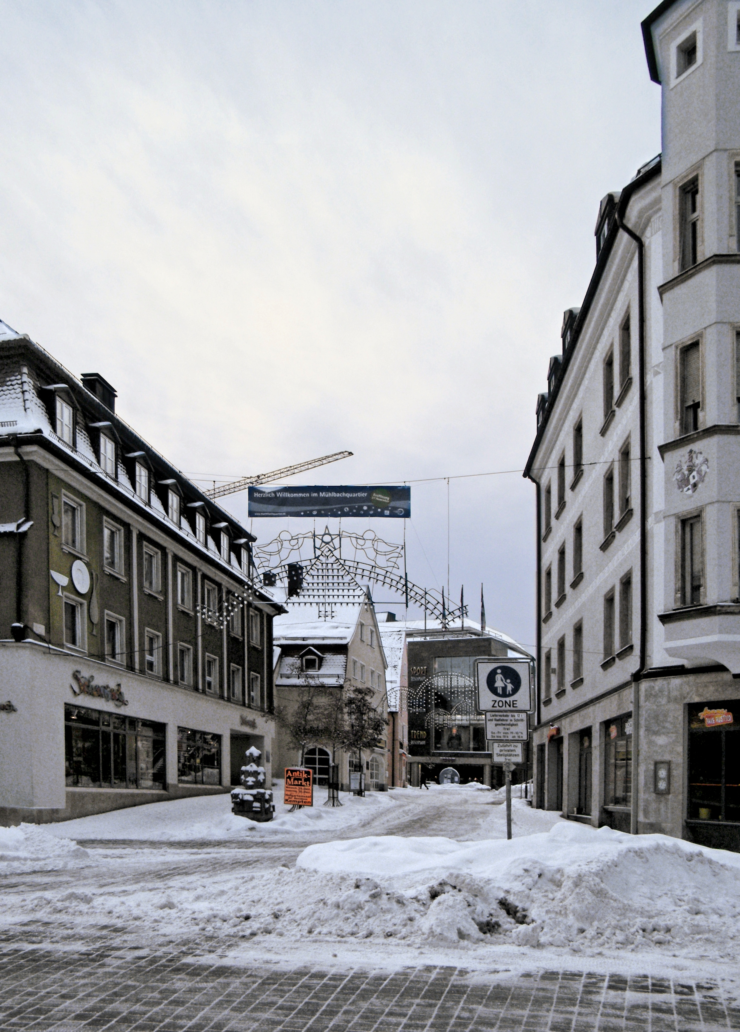 Standort des Klostertors in Kempten